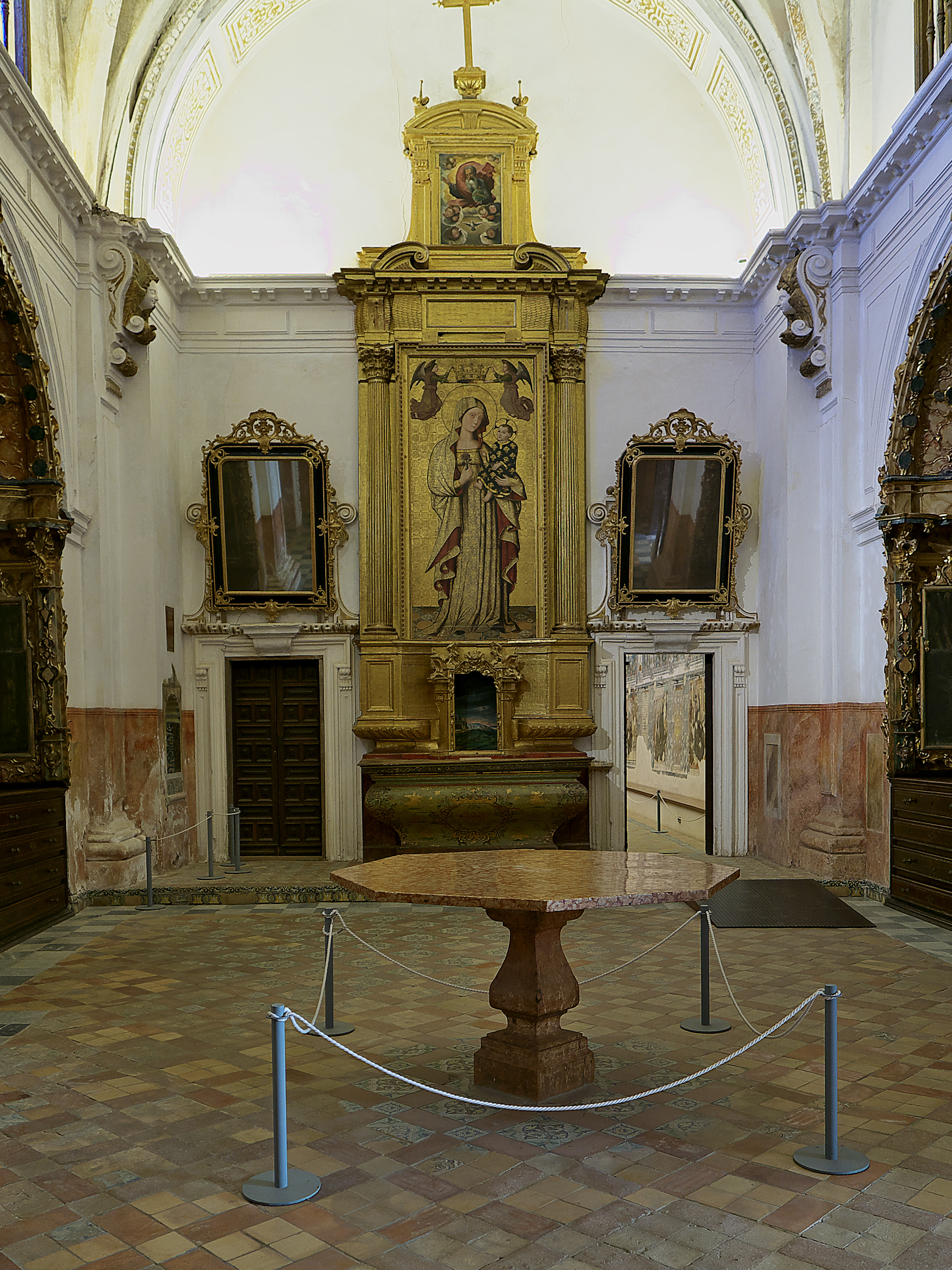 Situada junto a la iglesia. Su fábrica es del siglo XVI, reformada en 1615 y 1668.